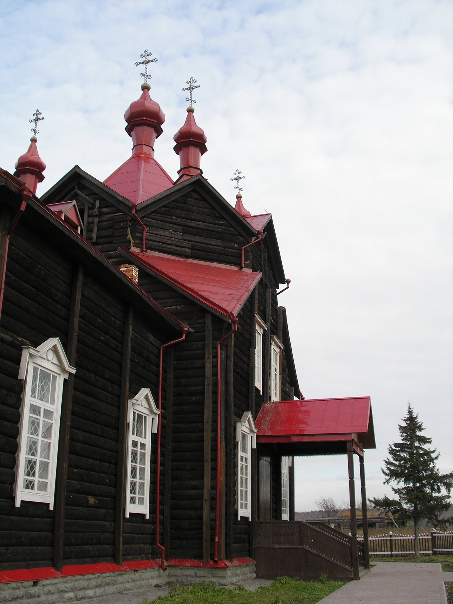 Церковь Святого Серафима (Новосибирская область, Болотнинский район, село Турнаево)